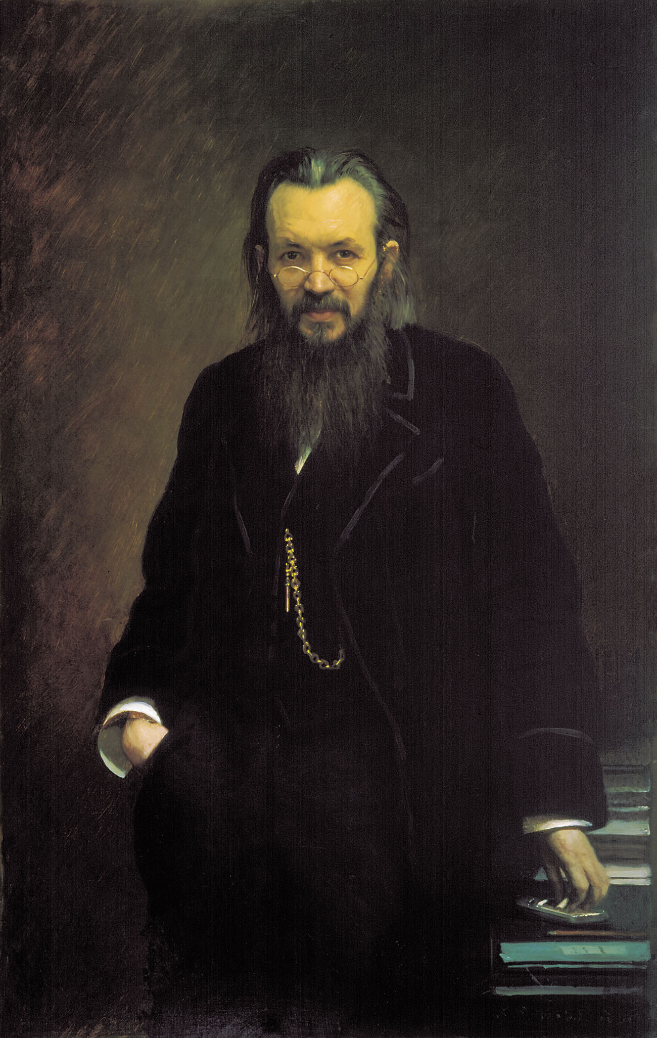 Ritratto di Aleksej Suvorin, olio su tela, Hermitage, San Pietroburgo